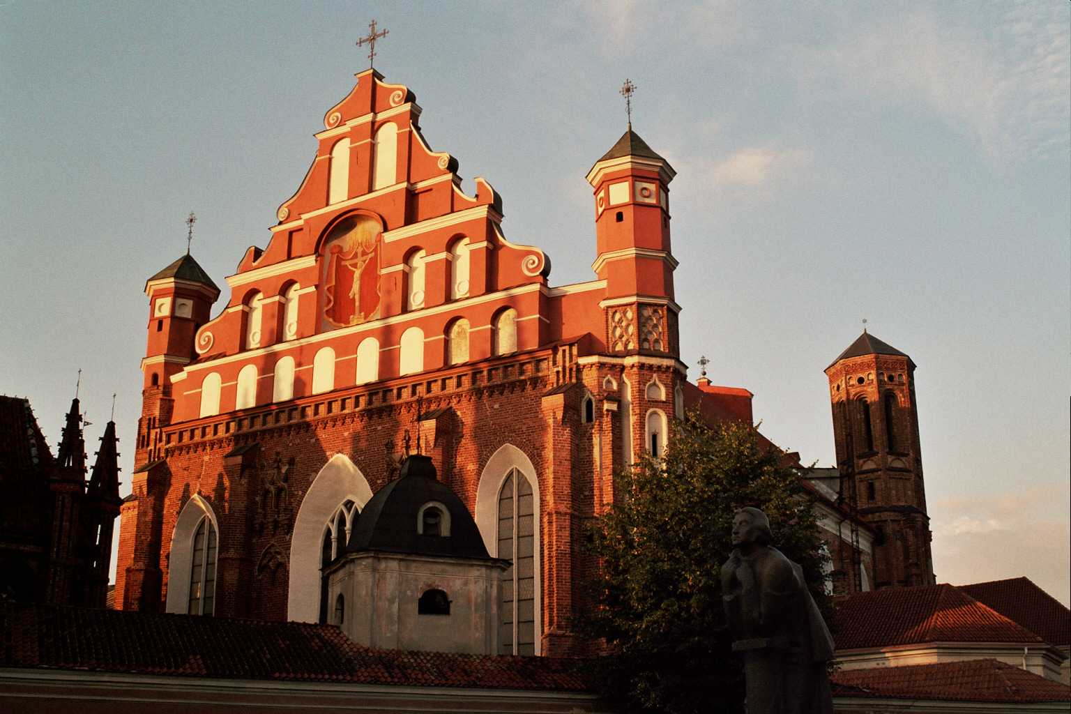 Mi faris tiun foton.